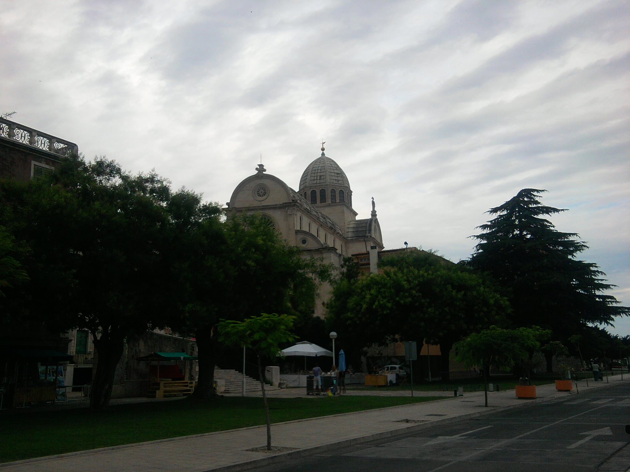 Šibeniki Szent Jakab katedrális. This place is a UNESCO World Heritage Site, listed as The Cathedral of St James in Šibenik.